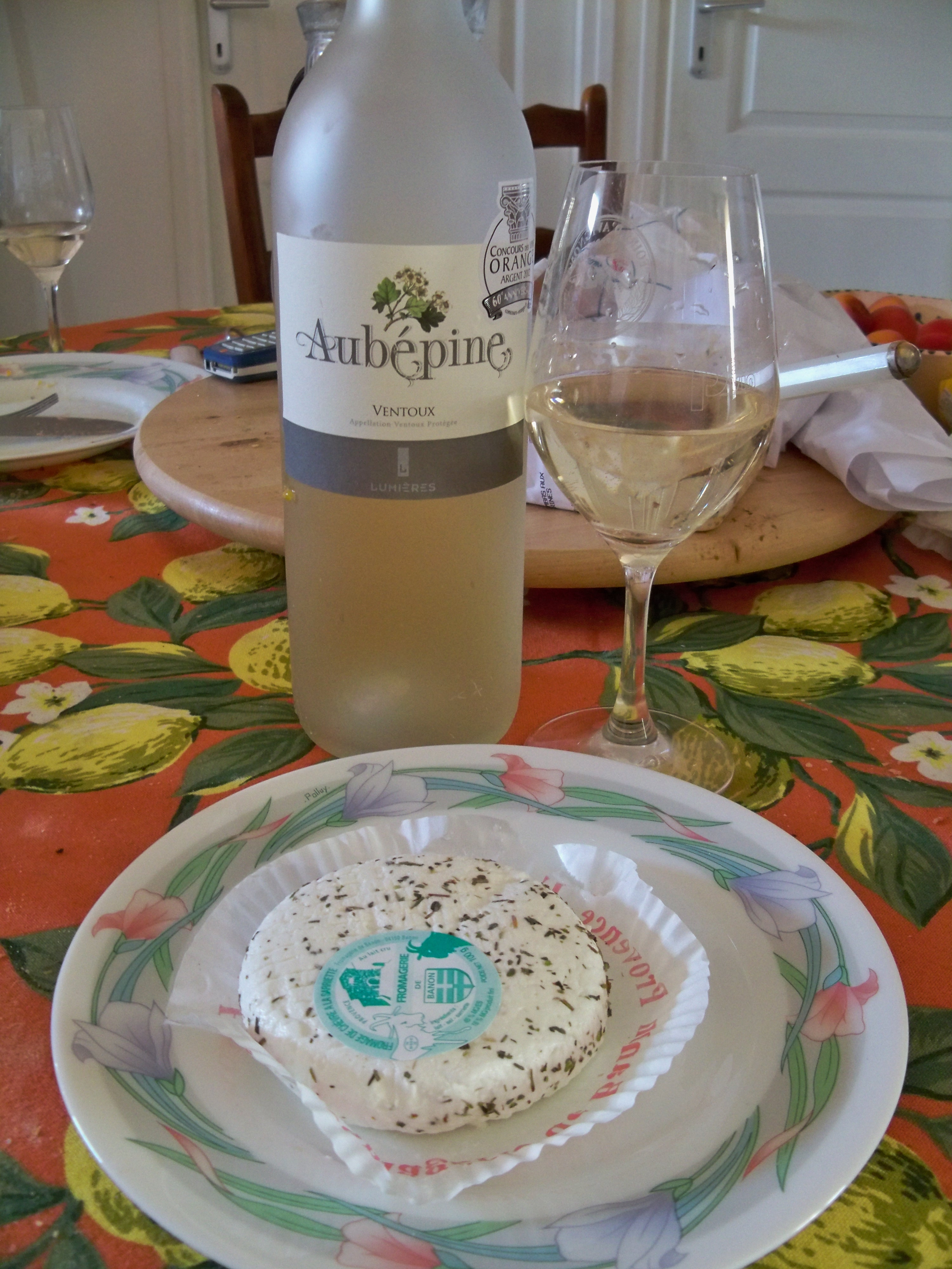 Fromage de chèvres : poivre d’âne, accompagné d'AOC Ventoux